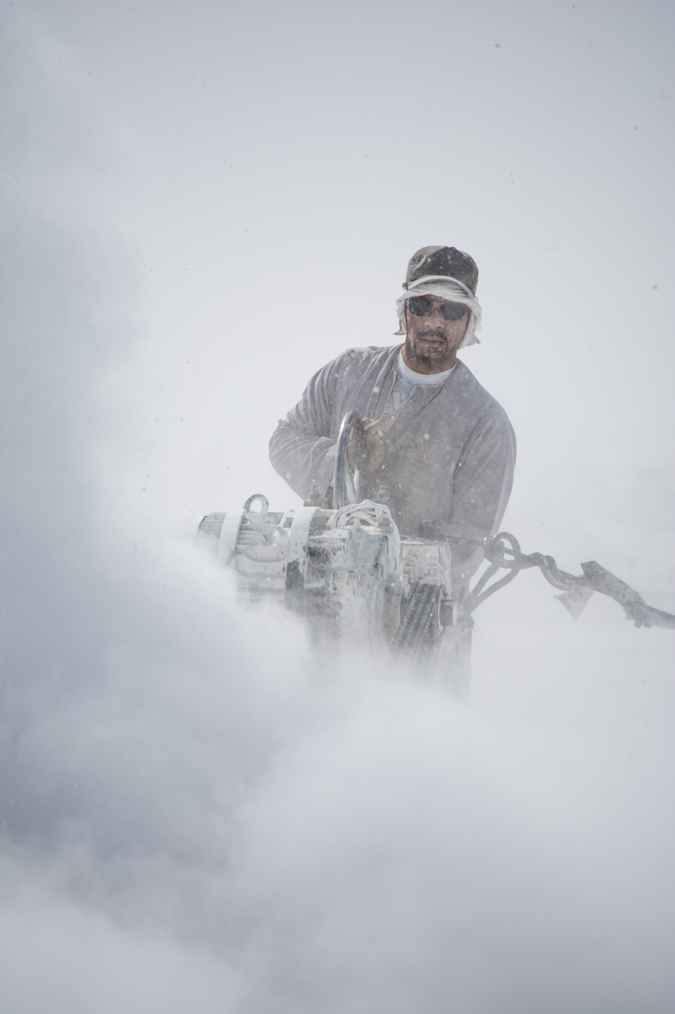 مصرى: احد عمال محاجر الطوب الابيض بمحافظة المنيا This is an image of "African people at work" from Egypt